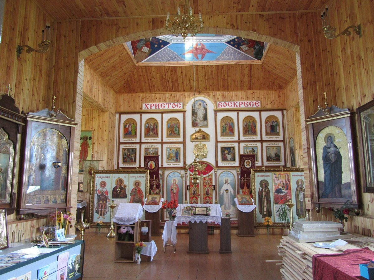 Глыбоцкае. Свята-Раства-Багародзіцкая царква